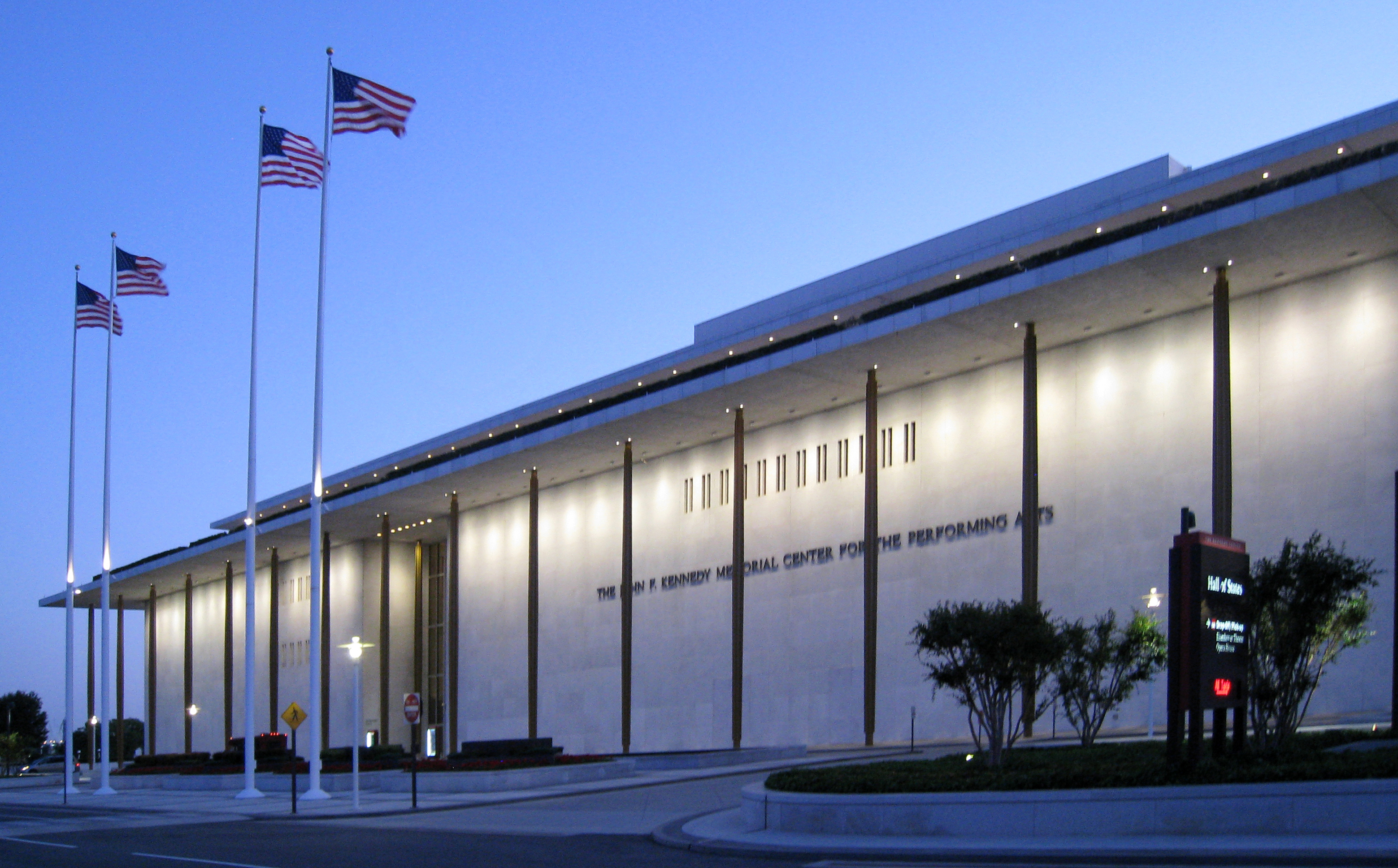 Kennedy Center at Dusk